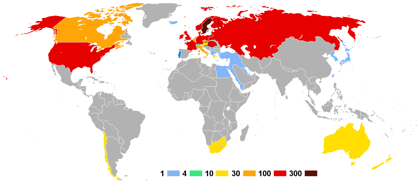 Olympische Sommerspiele 1928 — Anzahl der Athleten